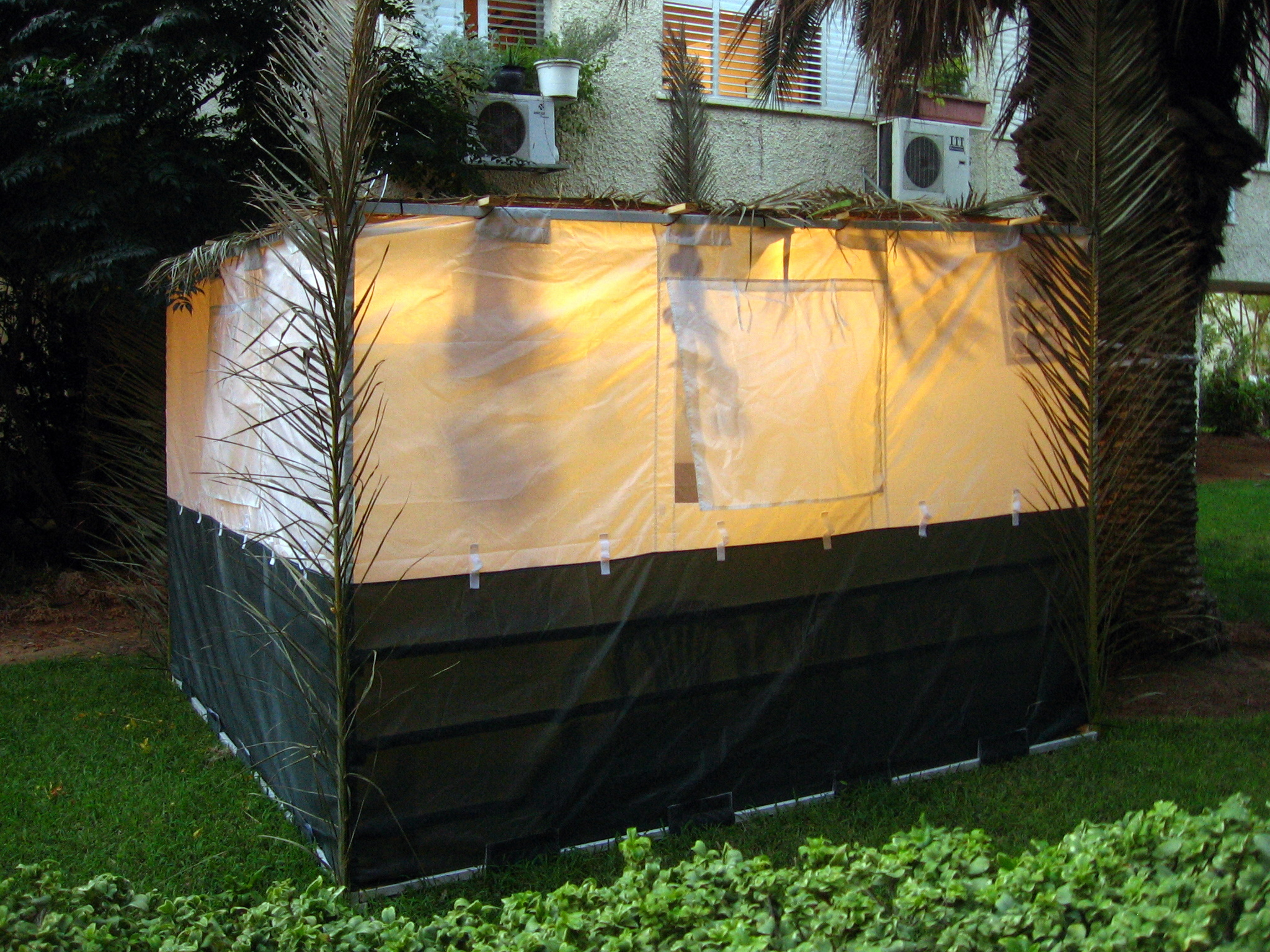 Sukkah